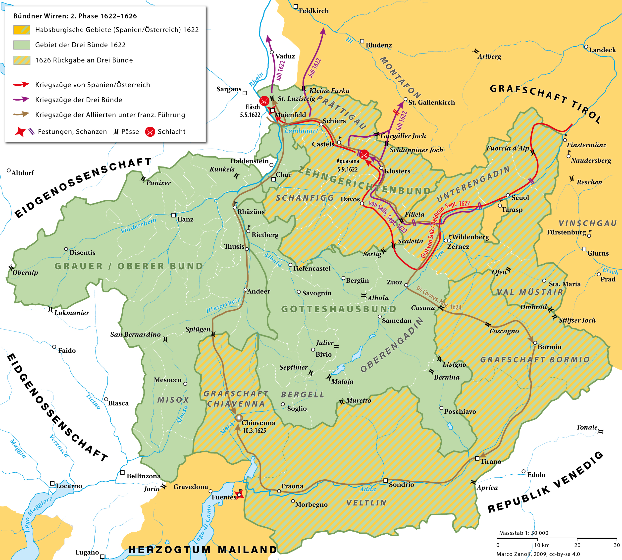 Die zweite Phase der Bündner Wirren 1622–1626: Vom Prättigauer Aufstand zur zweiten österreichischen Invasion bis zur ersten französischen Invasion und dem Vertrag von Monzon 1626.